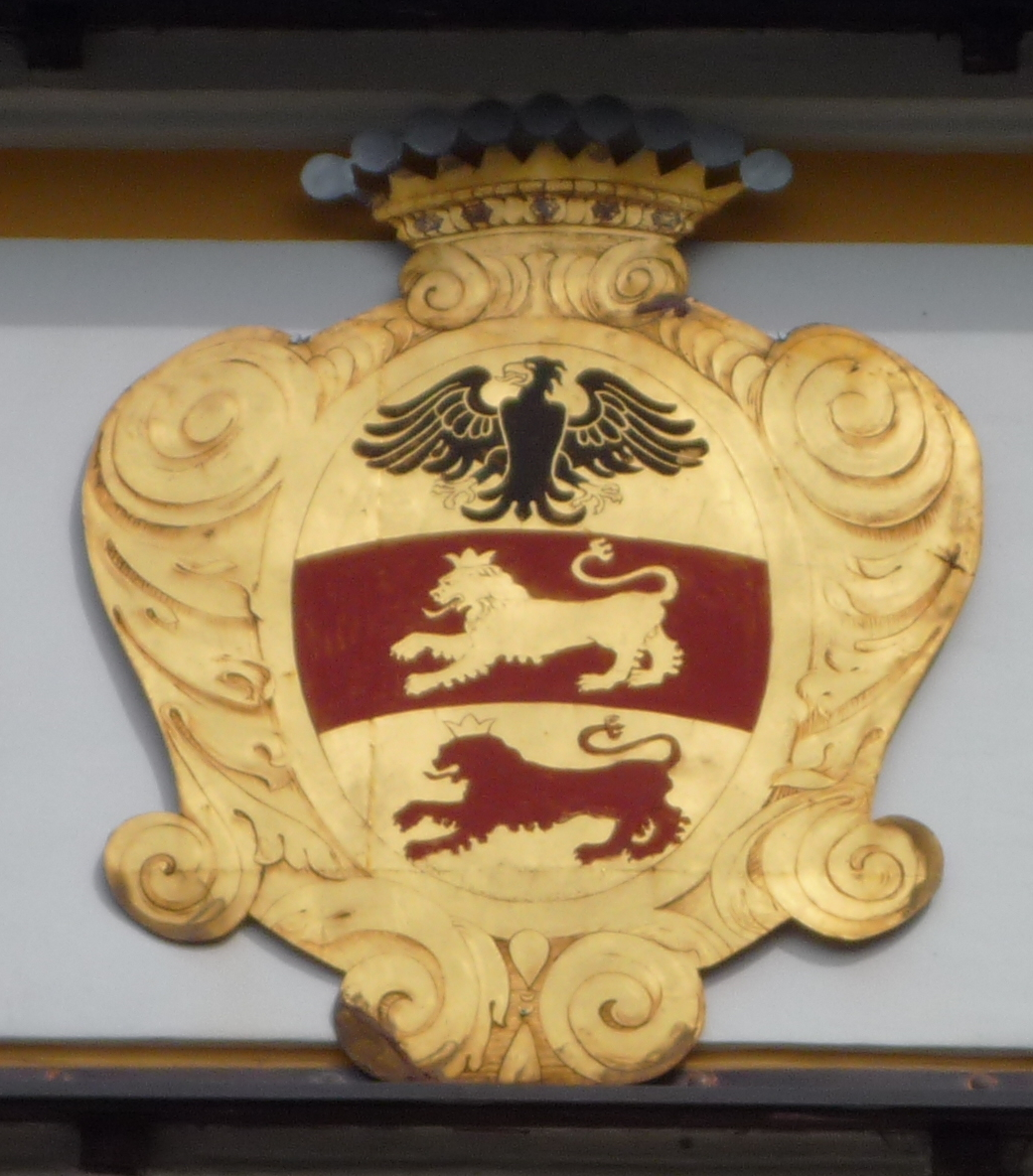 Erb Belcrediů nad vstupní bránou do Líšeňského zámku.